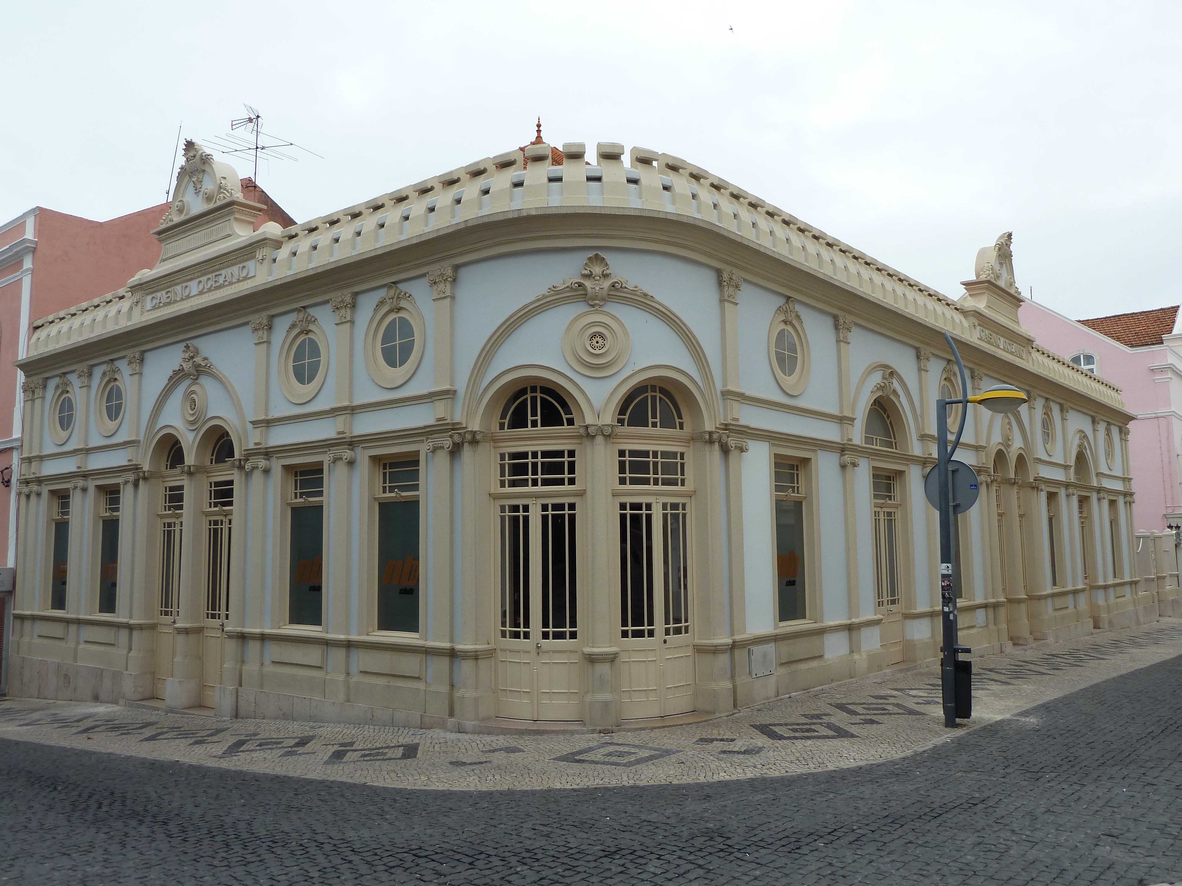 Casino Océano. Figueira da Foz This file was uploaded for Wiki Loves Monuments in Portugal with the unique identifier 71190.